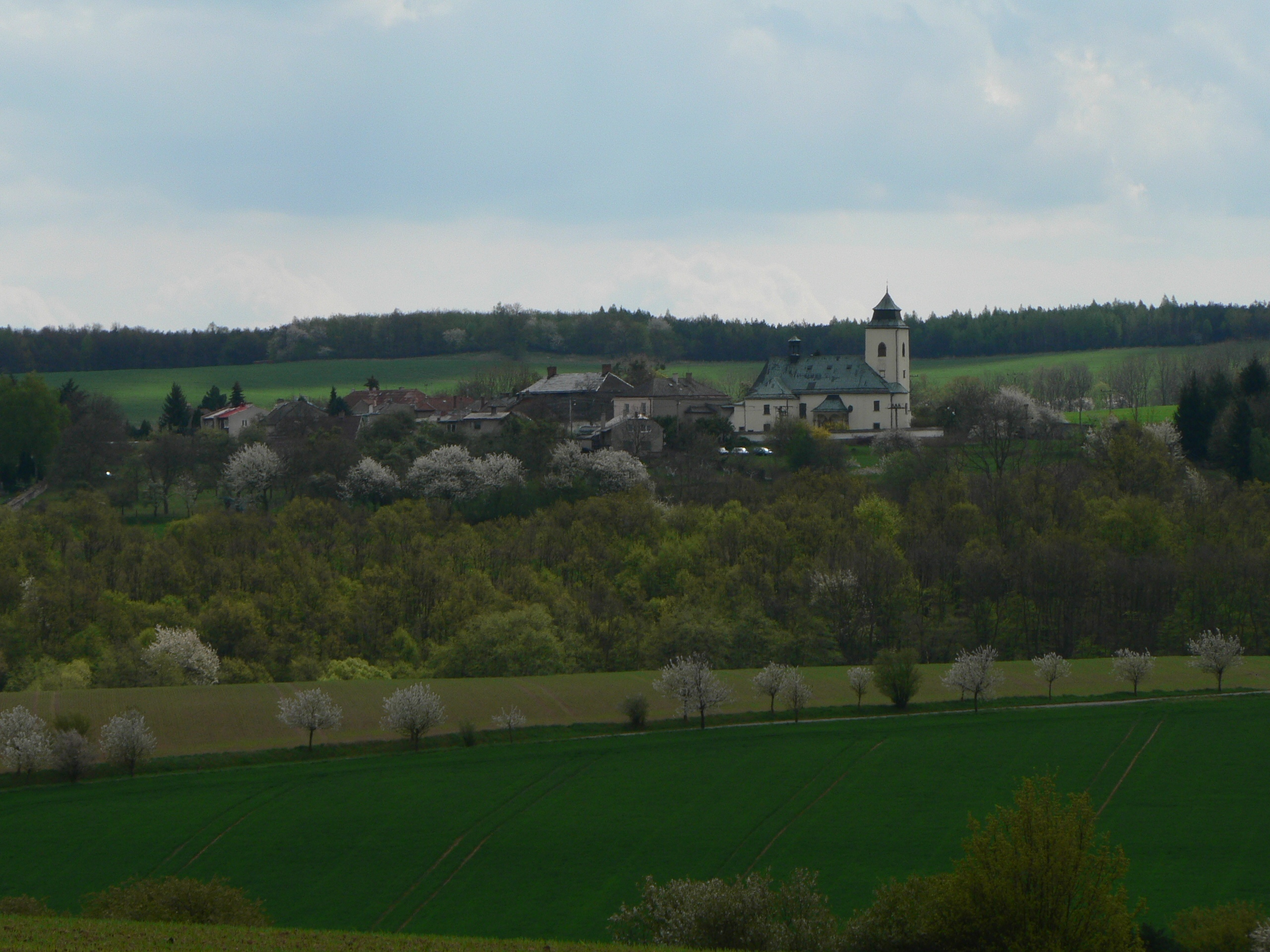 Pohled na Měrotín od západu.